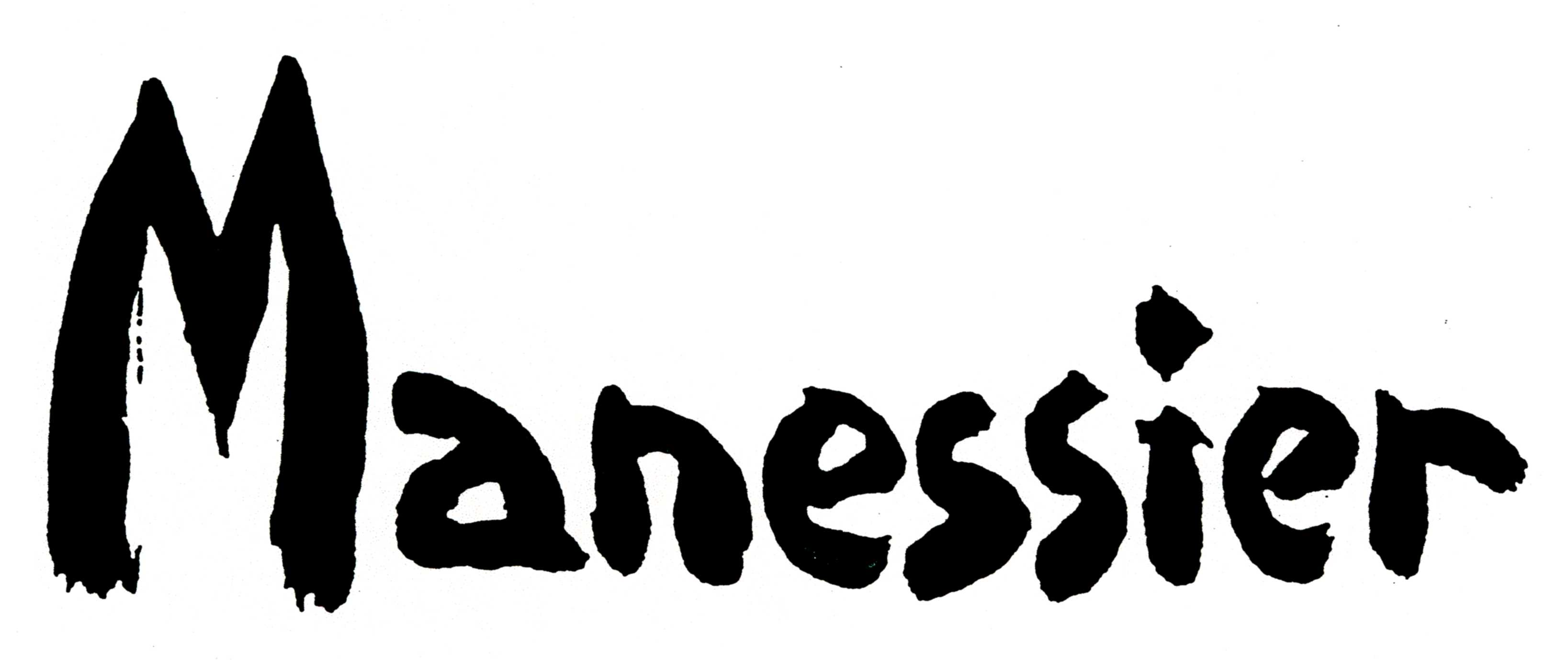 Signature du peintre Alfred Manessier, scan d'après carton d'invitation. This signature is believed to be ineligible for copyright and therefore in the public domain because it falls below the required level of originality for copyright protection both in the United States and in the source country (if different). In this case, the source country (e.g. the country of nationality of the signatory) is believed to be France. Cette image ou le texte qui y est représenté est seulement composé de formes géométriques simples et de texte. Elle n’atteint pas le seuil d'originalité nécessaire pour la protection du droit d’auteur, et est donc du domaine public. See autographs of Magritte and Picasso